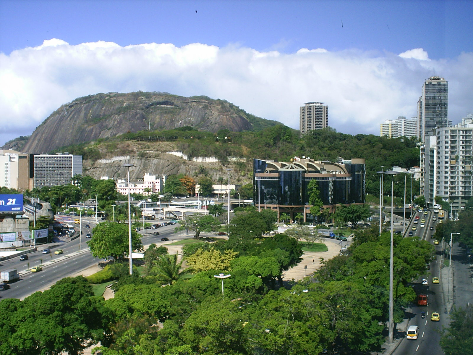 Praça Pimentel Duarte & Centro Empresarial Mourisco em Botafogo, RJ, Brasil